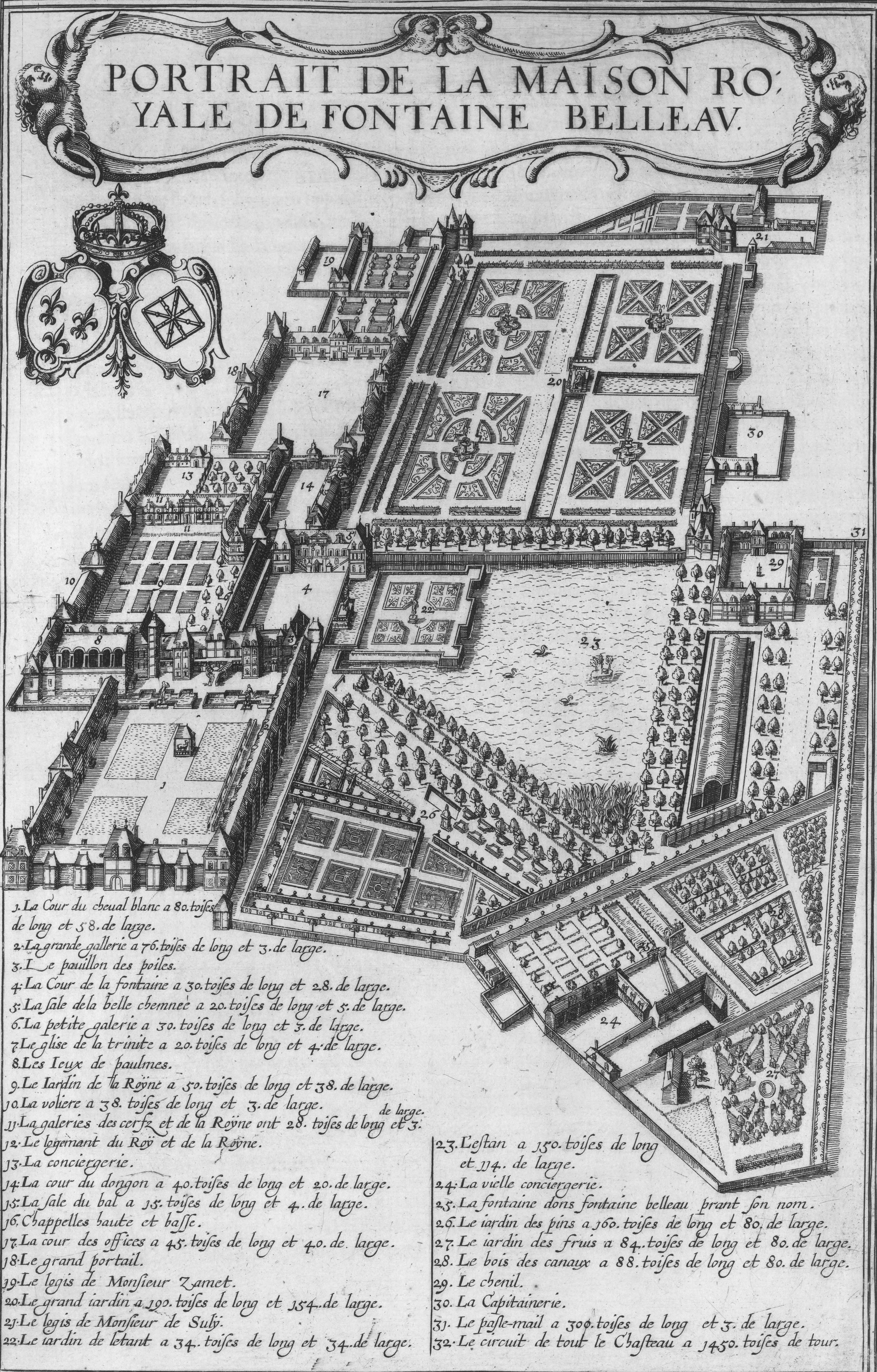 Portrait de la Maison Royale de Fontaine Belleau (Fontainebleau). Van der Krogt Vol IV-2: 4113